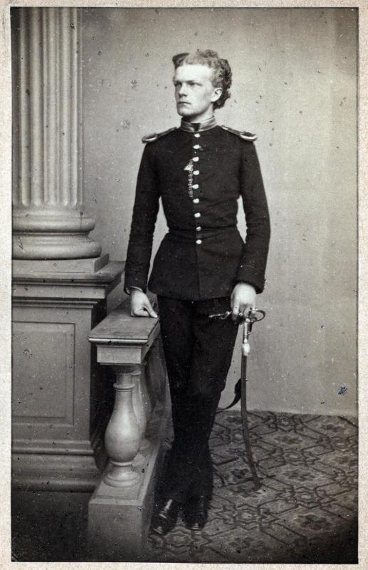 Carl Theodor in Bayern in Uniform